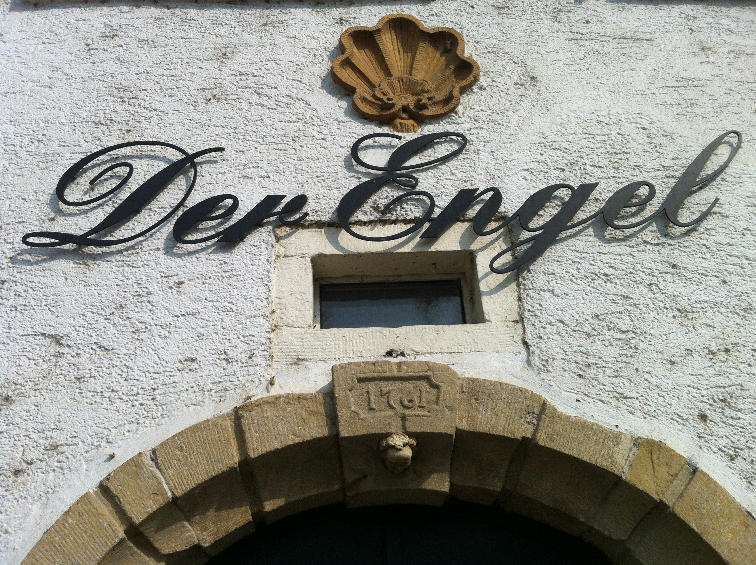 Küssaberg, Gemeinde im Landkreis Waldshut in Baden-Württemberg. Portal des Gasthofs Engel (mit Jakobsmuschel) in Rheinheim.